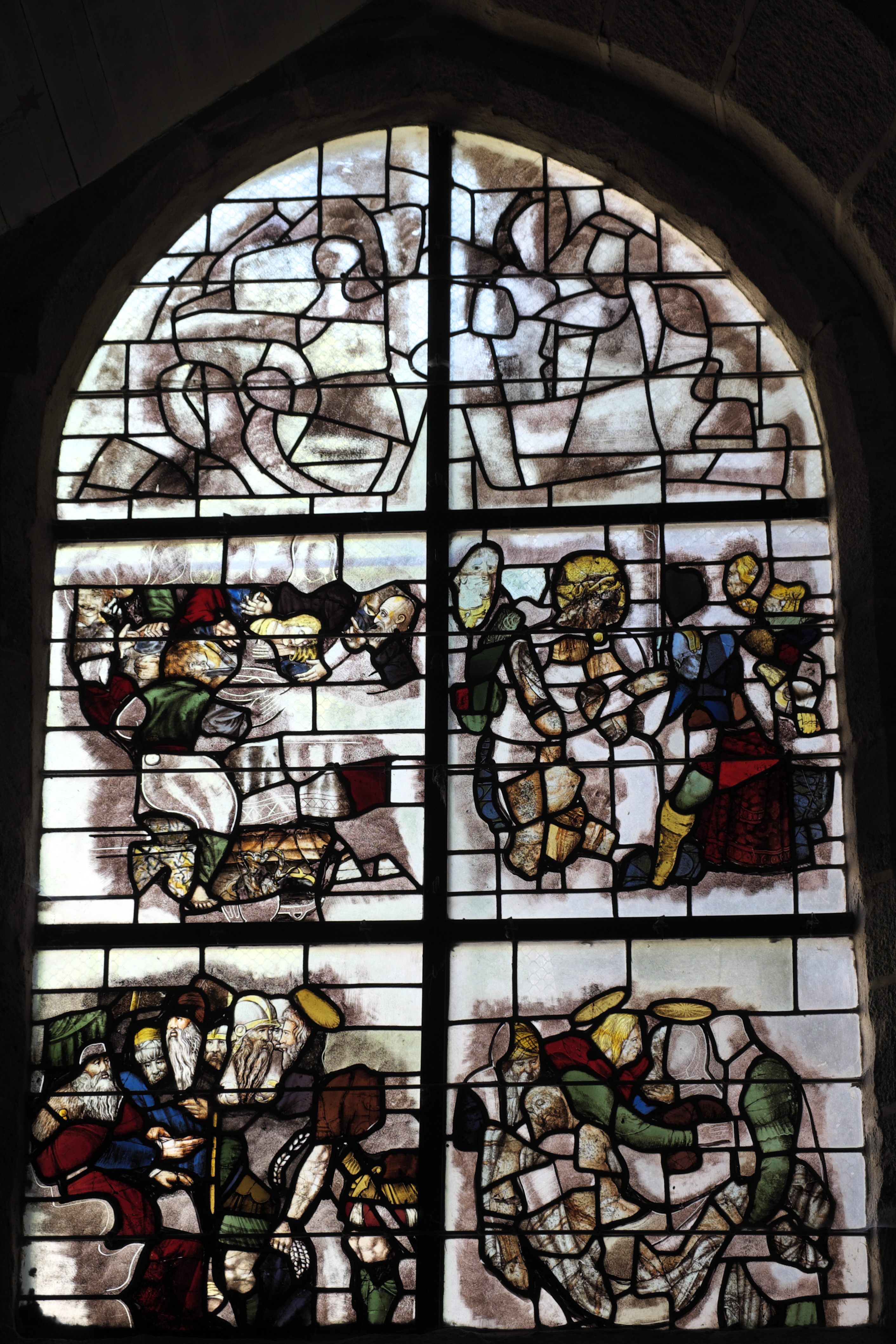 Ehemalige Stiftskirche Notre-Dame-de-Roscudon in Pont-Croix im Département Finistère (Region Bretagne/Frankreich), Fragmente von Bleiglasfenstern aus dem 16. Jahrhundert